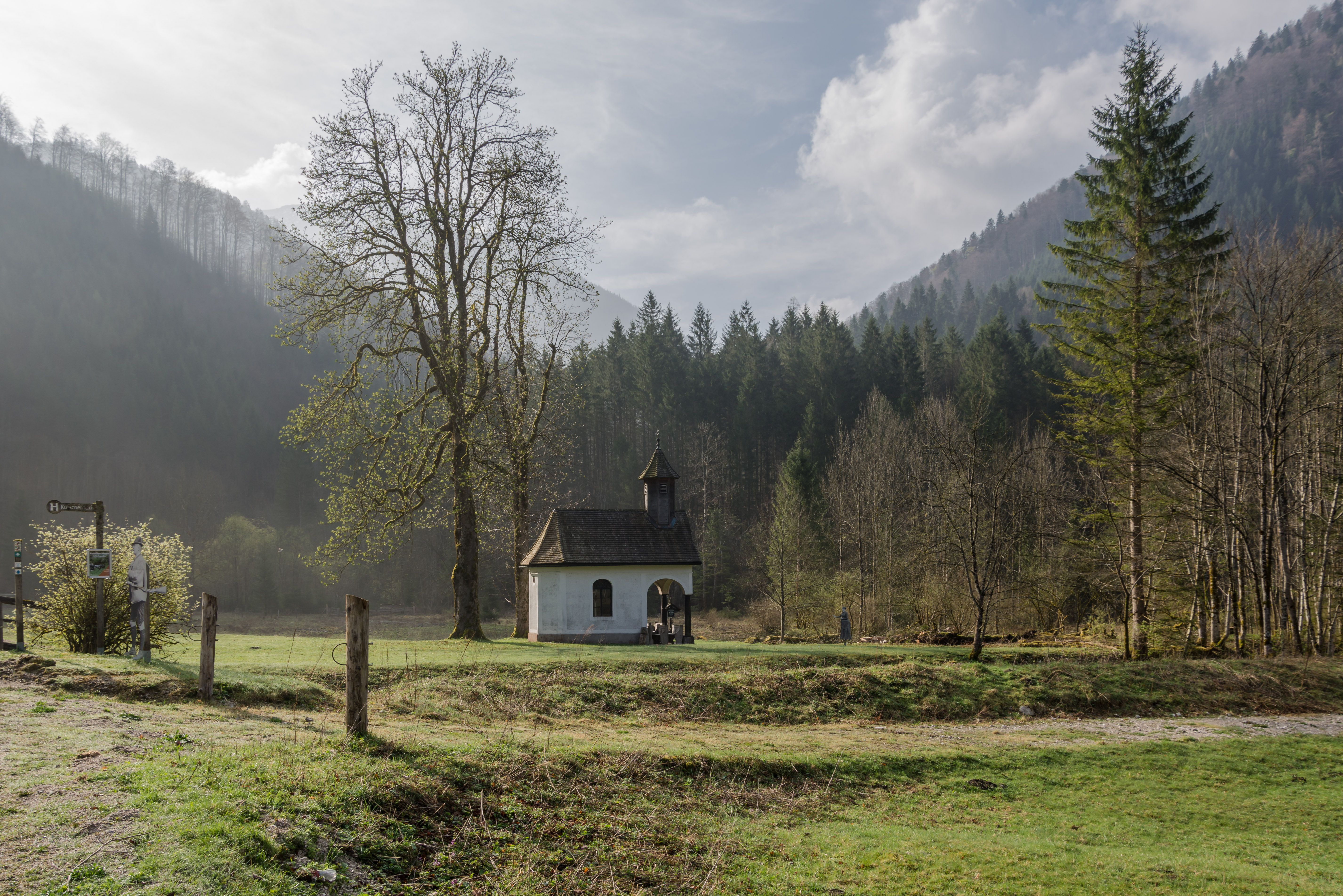 Anna-Kapelle This file shows the National Park Kalkalpen in Austria.